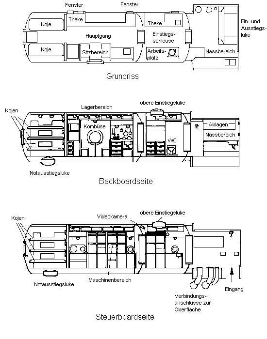 Innerer Aufbau Aquarius